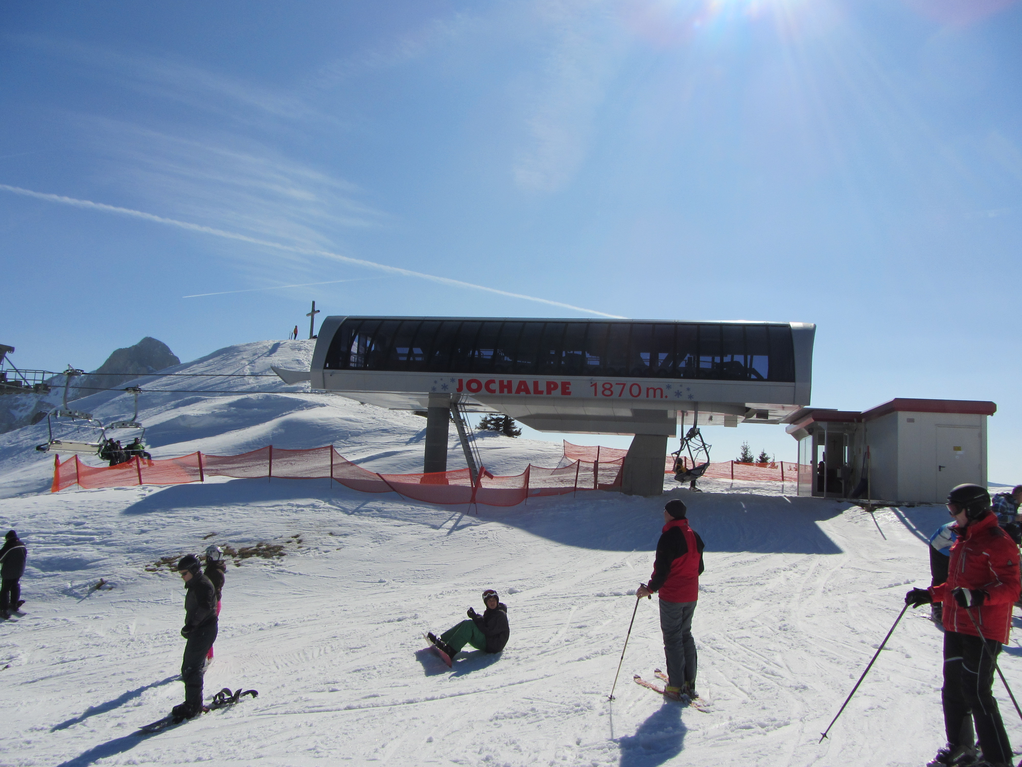 Bergbahn Füssener Jöchle in Grän, Tannheimer Tal, Tirol